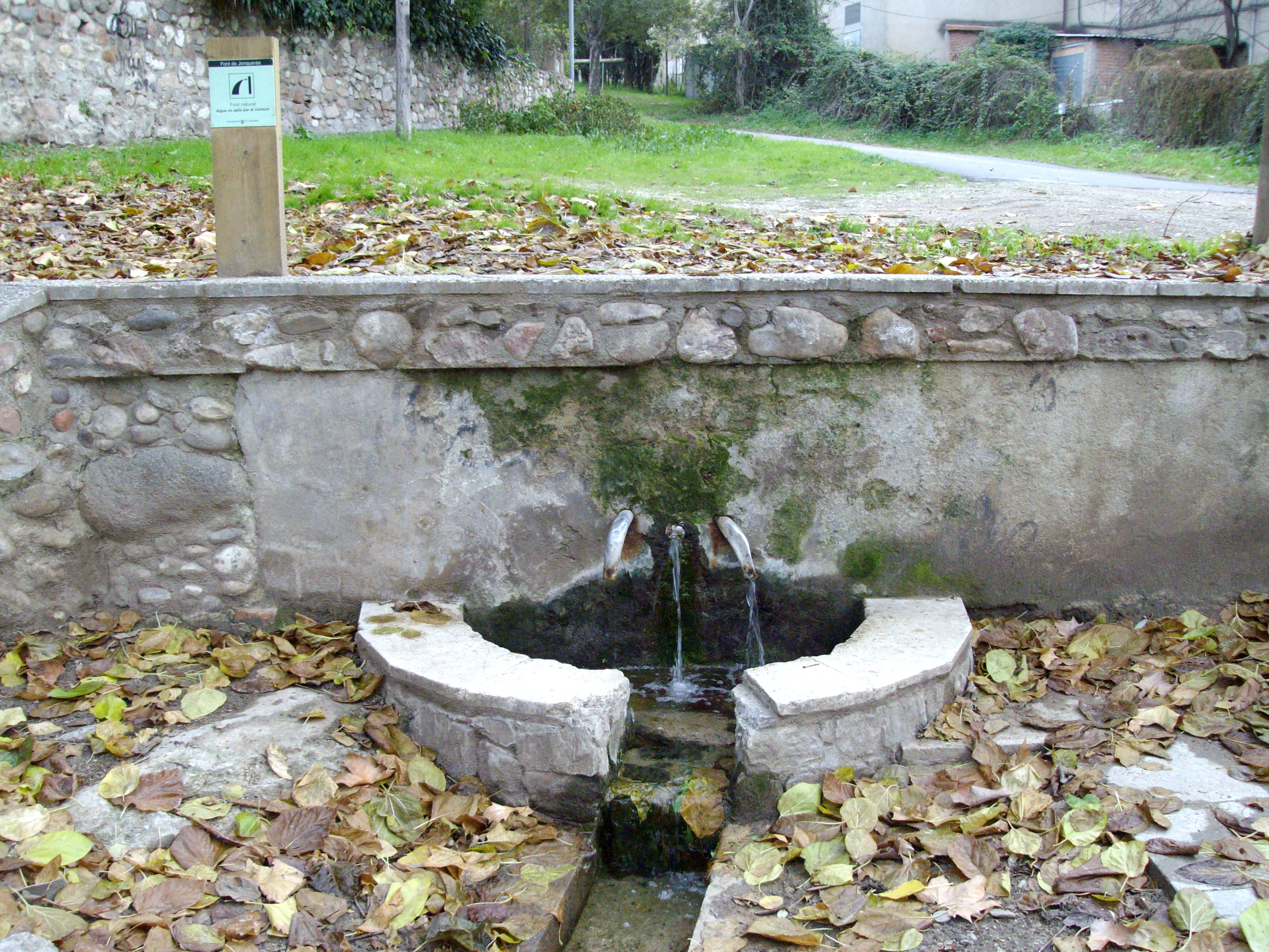 Fuente de Jonqueres. Fuente natural situada en el margen derecho del río Ripoll, en el camino hacia la ermita de Sant Vicenç de Jonqueres, en Sabadell, Barcelona (España).